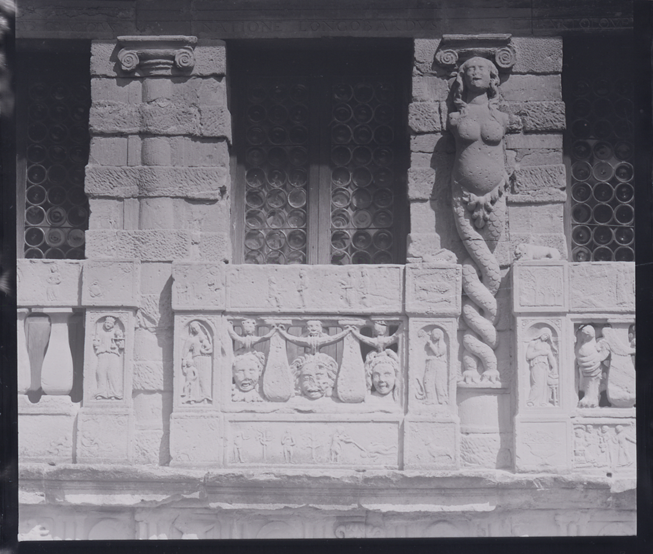 Servizio fotografico : Asolo, 1966 / Paolo Monti. - Buste: 4, Fototipi: 4 : Negativo b/n, gelatina bromuro d'argento/ pellicola ; 6x6. - ((Serie costituita da 4 buste sciolte di negativi identificati con i nn.: 12655, 12656, 12657, 12658. - La suddetta serie è contenuta nella scatola G12501-13000, formato 24x30. - Occasione: Documentazione per la pubblicazione: Cecchi Emilio, Sapegno Natalino (a cura di), "Storia della Letteratura Italiana", 9 voll., Milano, Garzanti, 1966 e segg. - Fonte: Agenda di Paolo Monti: Monti/ 3 aprile 1966 - 9 marzo 1971/ 12421-16823 (1966-1971), presso Archivio Paolo Monti. - Fonte: Monografia di Cecchi Emilio, Sapegno Natalino (a cura di): Storia della Letteratura Italiana, 9 voll., Milano, Garzanti (1966 e segg.)